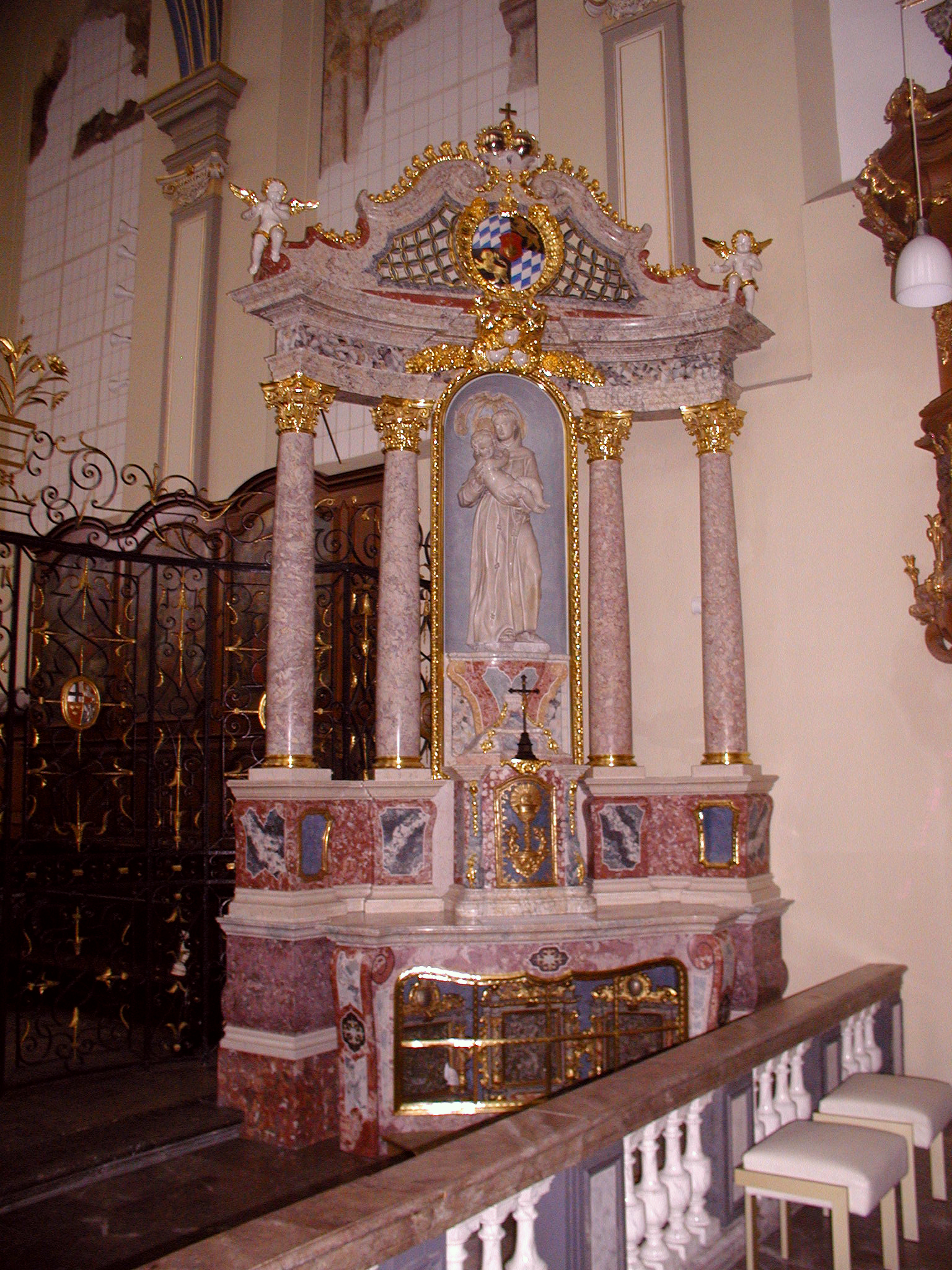 Brühl, Schlosskirche